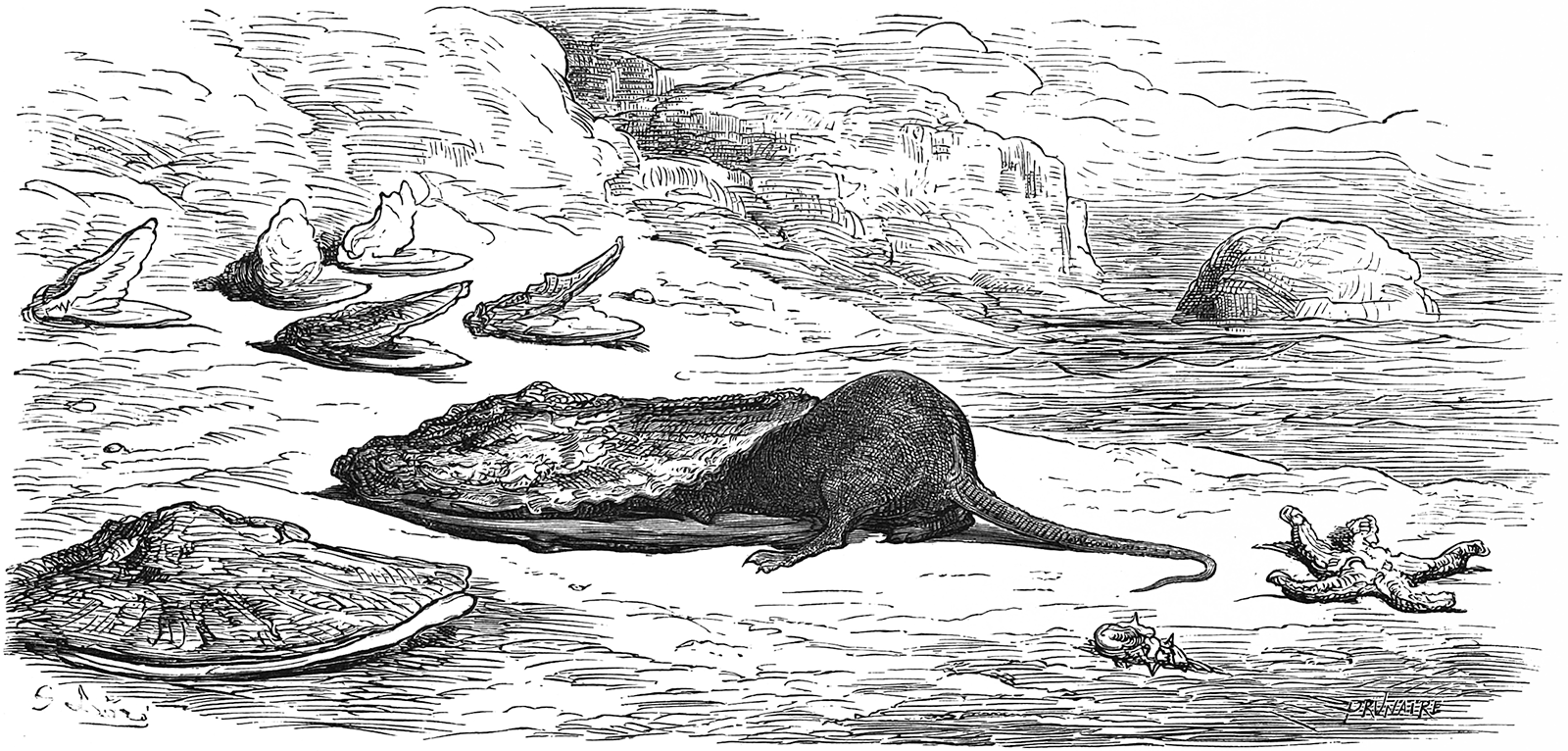 grafika z książki PL Bajki, Jean de La Fontaine, nakładem i drukiem Jana Noskowskiego, Warszawa 1876